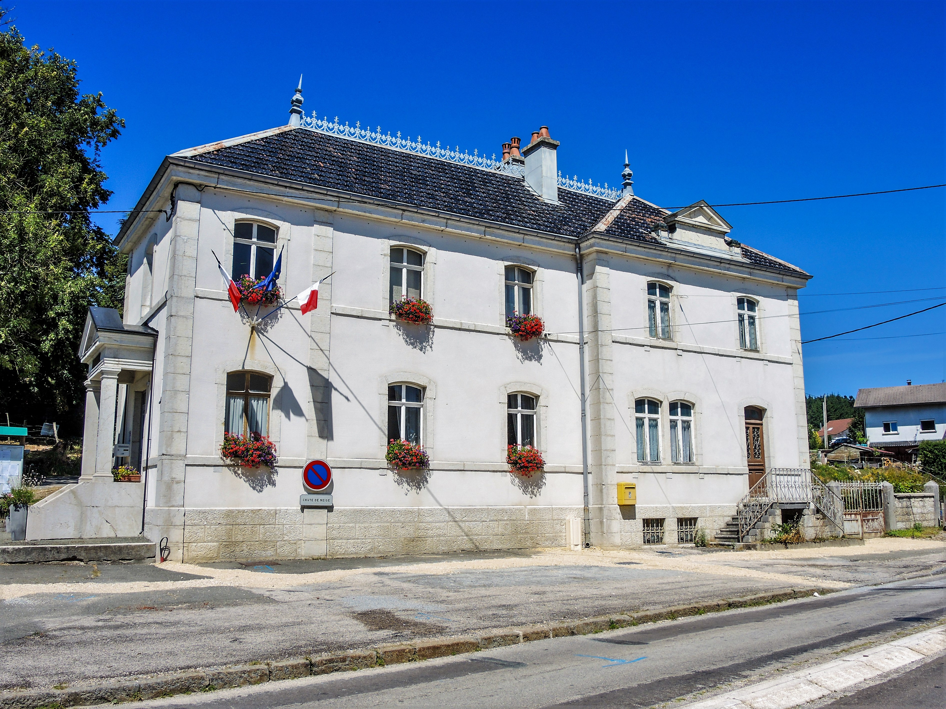 Mairie des Fontenelles. Doubs